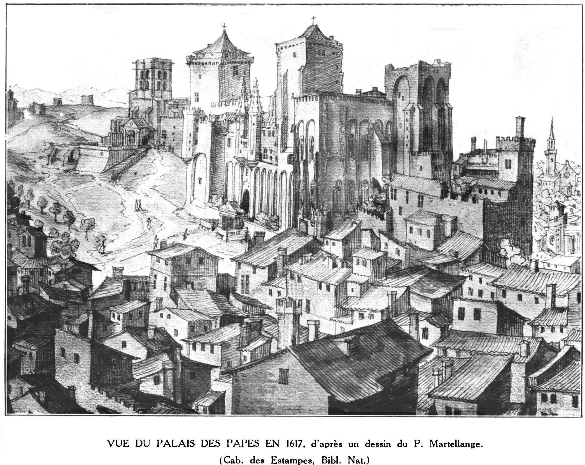 Vue du palais des papes, Martelange, 1617